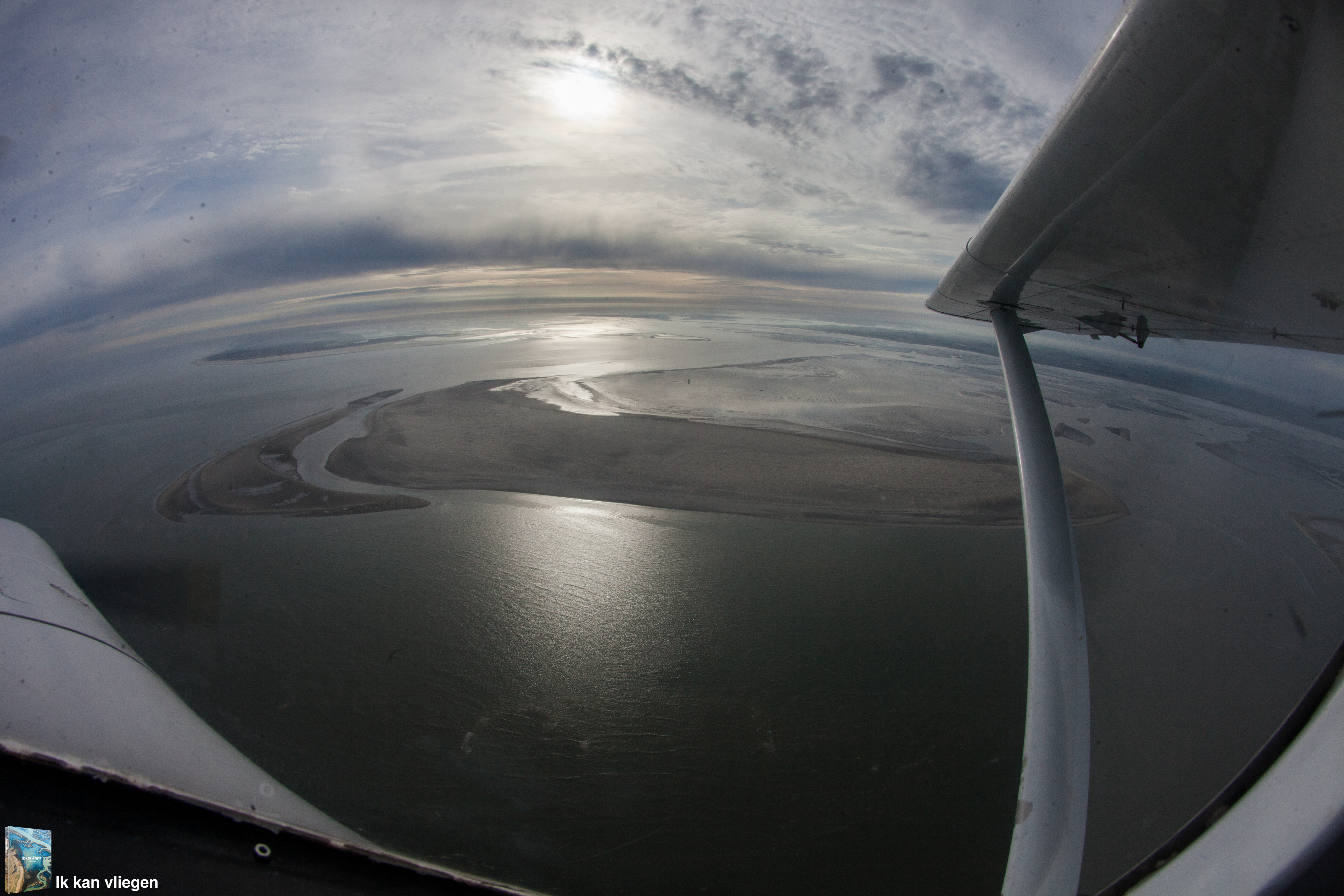 WW17-175.jpg